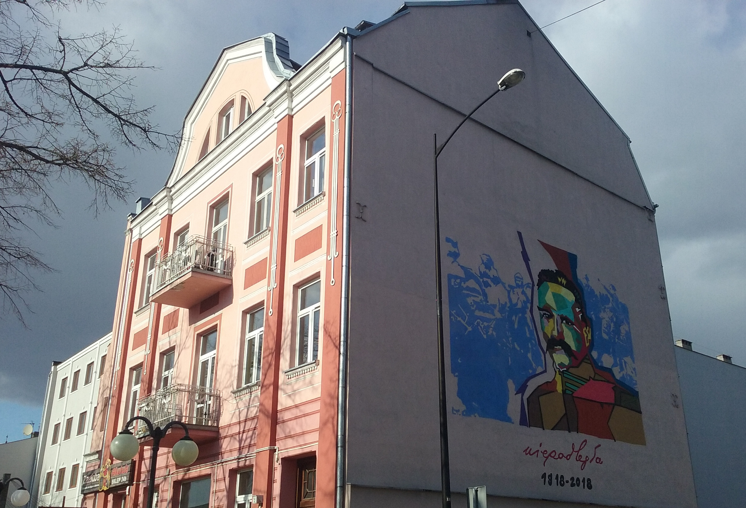 Budynek dawnego hotelu, w którego piwnicach Urząd Bezpieczeństwa Publicznego urządził katownie dla uczestników powstanie antykomunistycznego w Polsce ( z lat 1944–1953) Po lewej stronie w tle, obecny Hotel Mazowiecki. Róg uic św. Antoniego i Tadeusza Kawki w Tomaszowie Mazowieckim